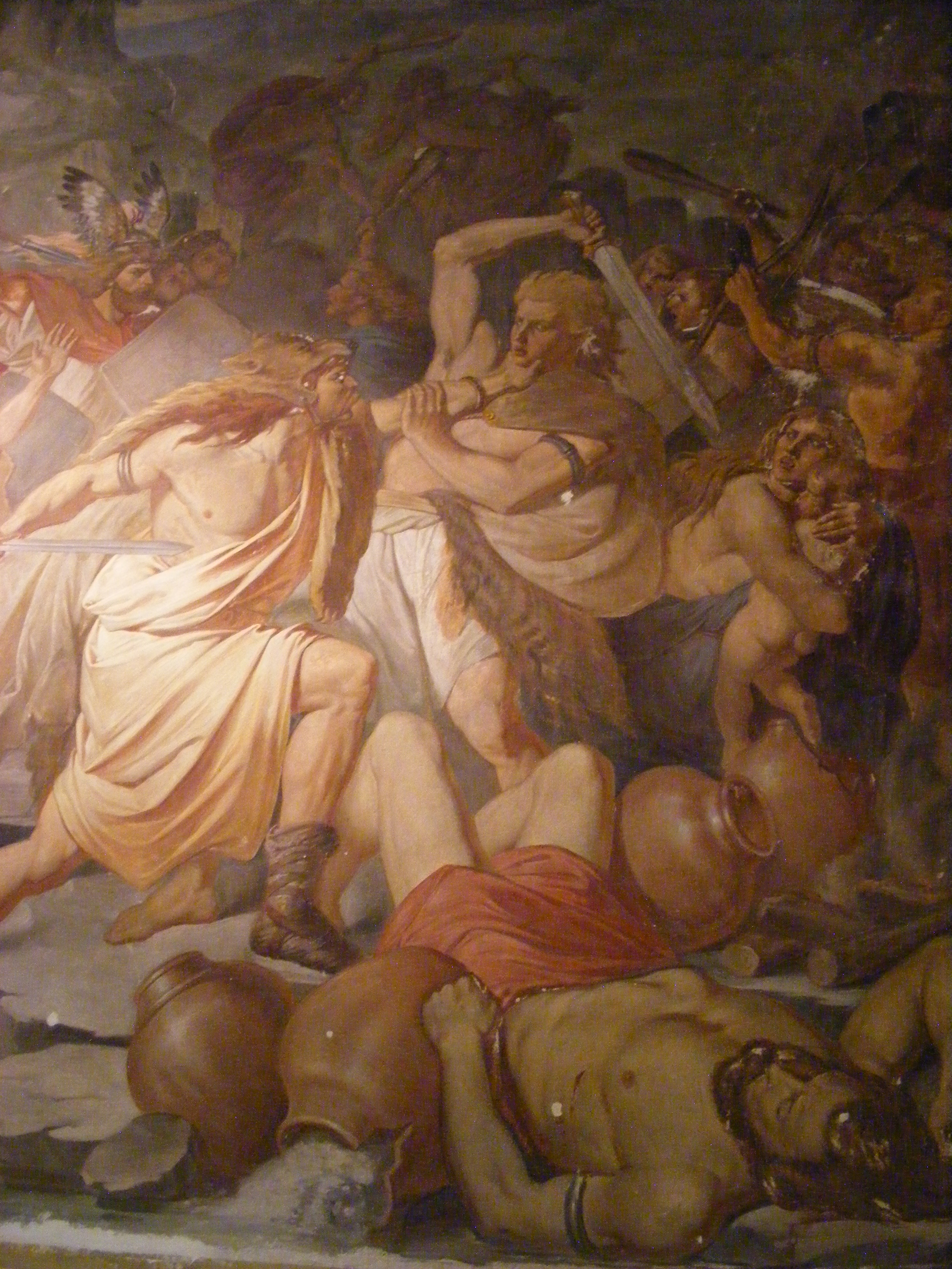 Fresko “Kampf der Hermunduren und Katten um die Salzquellen bei Kissingen 58 nach Christo” (Detail), gemalt von Georg Hiltensperger jun., o.J., 19. Jhd., Staatliches Museum für Völkerkunde München, I. OG